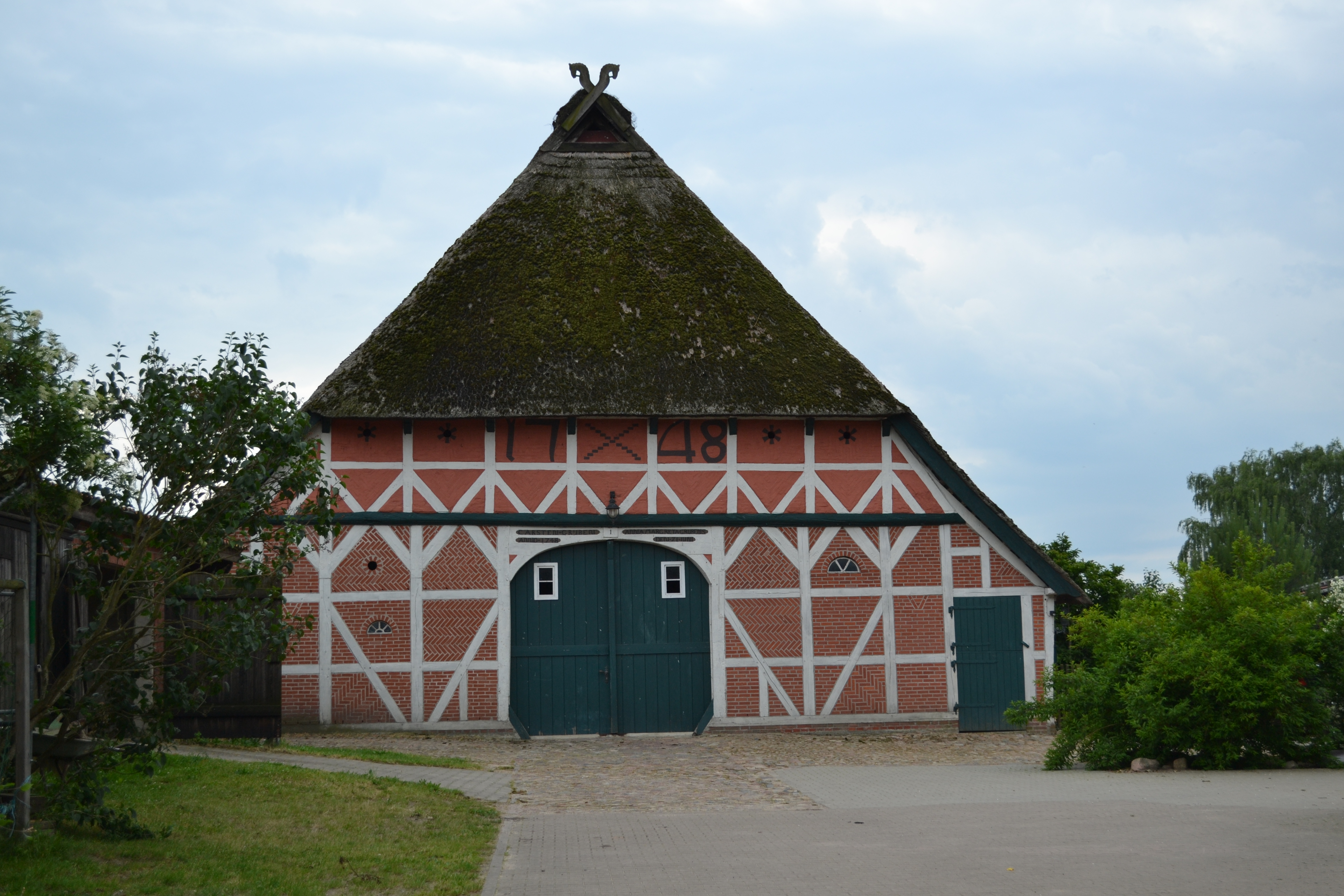 Bauernhaus Am Mühlenberg 1